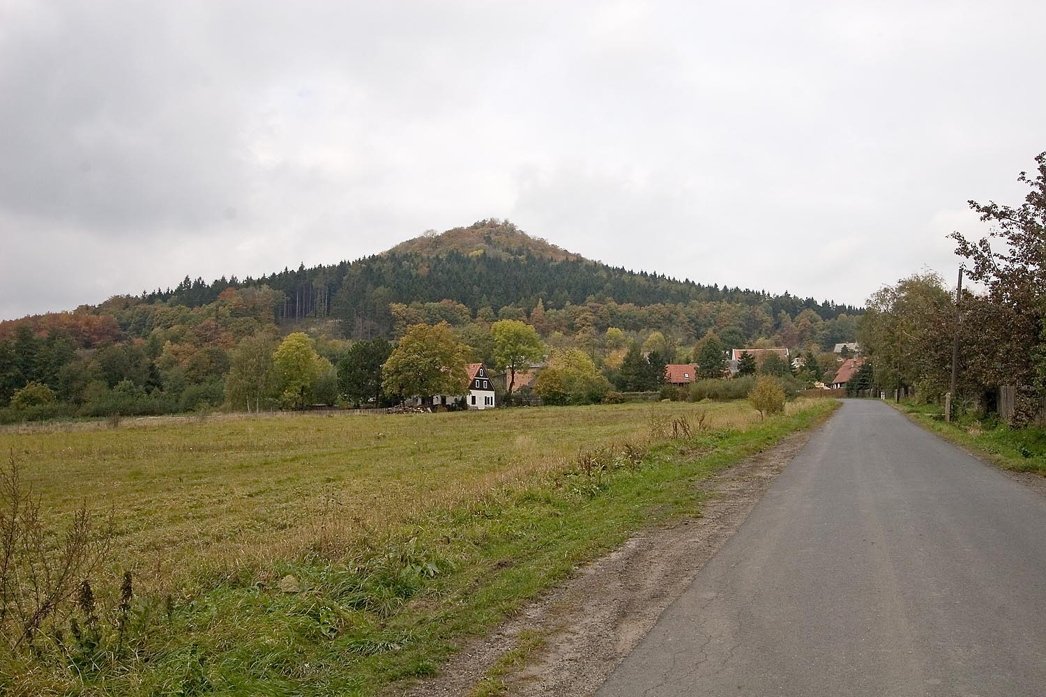 Hrad Panna - pohled na hradní vrch ze silnice od Řepčic